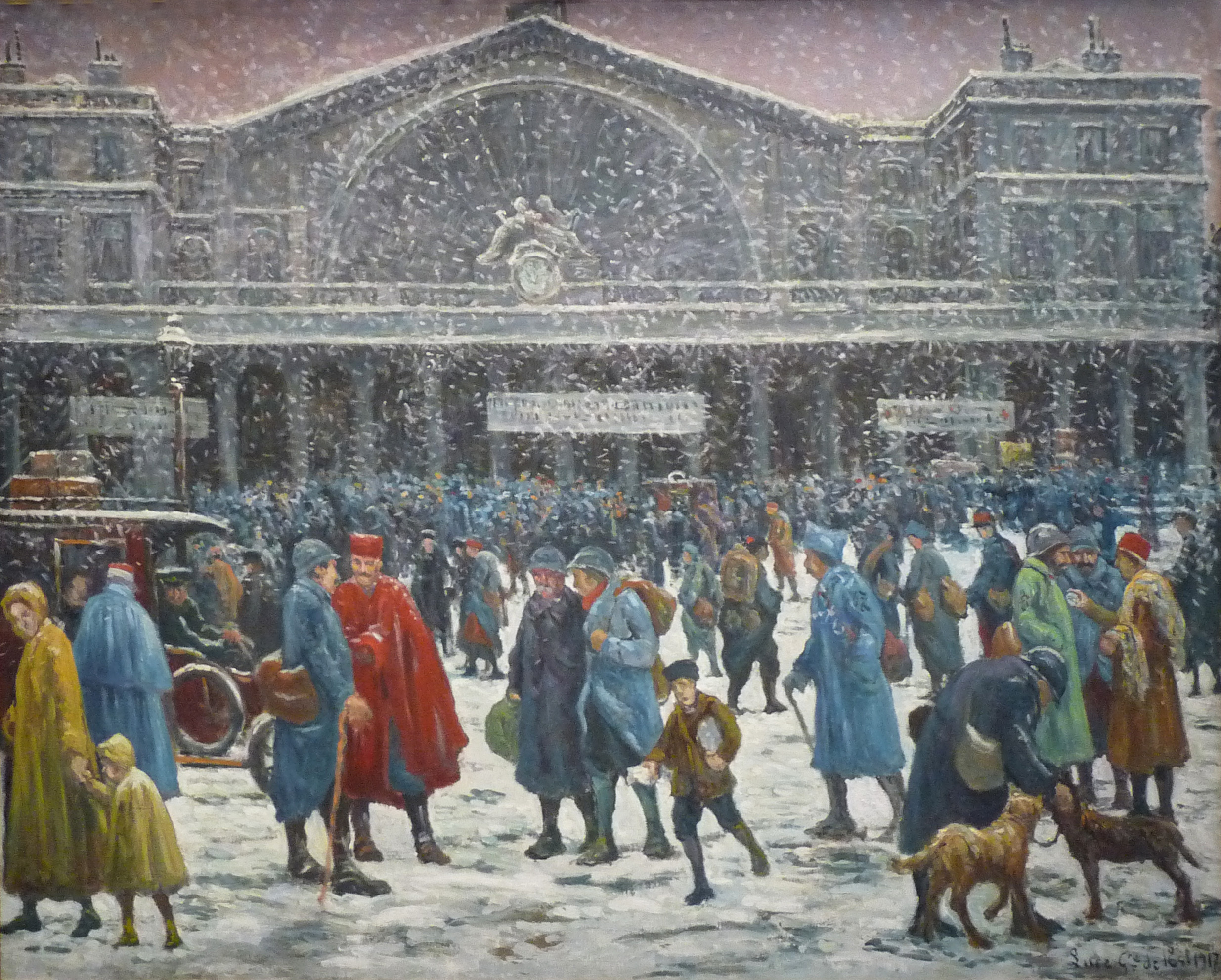 Maximilien Luce, La Gare de l'Est sous la neige, 1917. Musée de l'Hôtel-Dieu à Mantes-la-Jolie (exposition 1917 au Centre Pompidou-Metz)